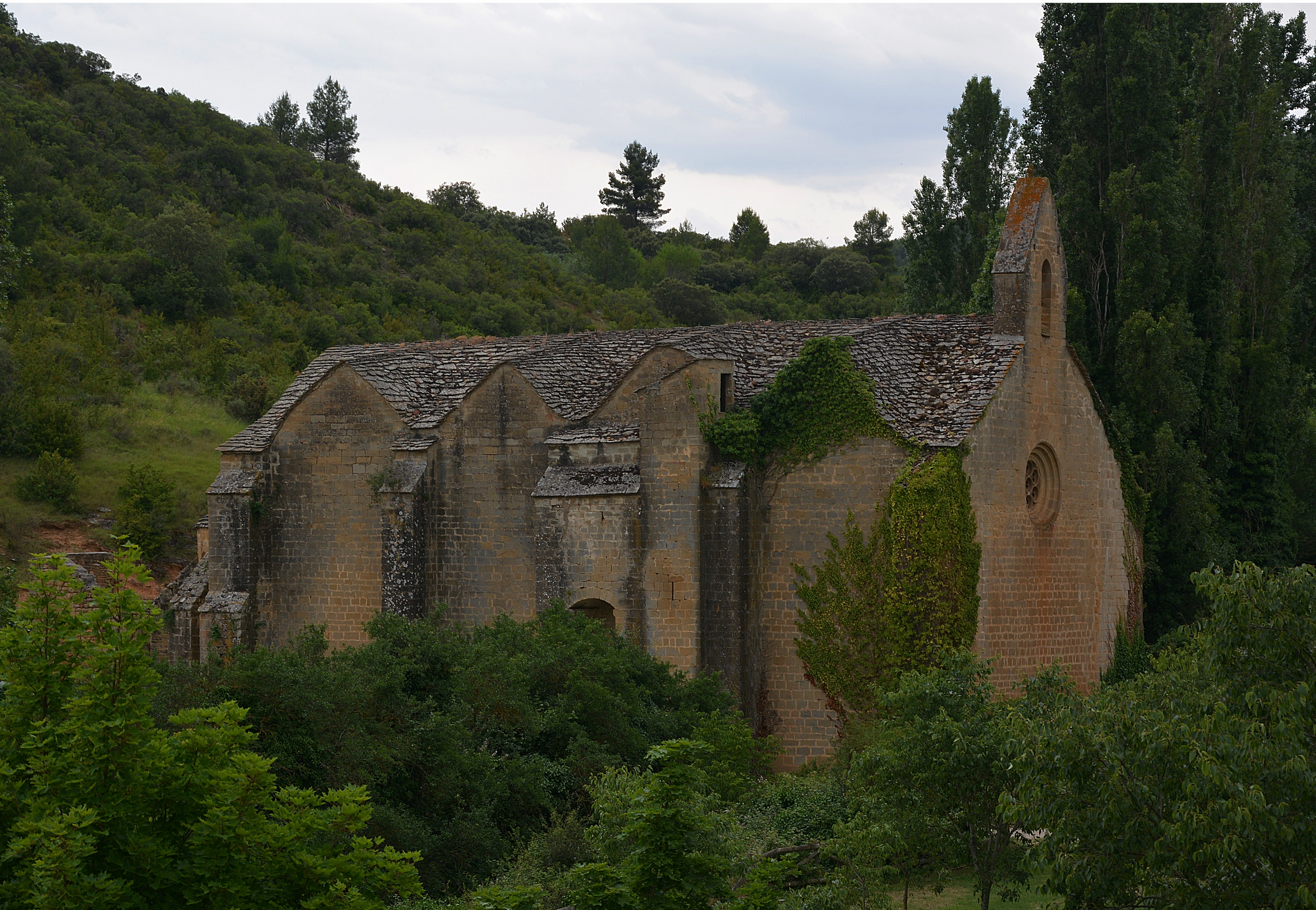 Ermita de San Zoido, en Cáseda, Navarra, España